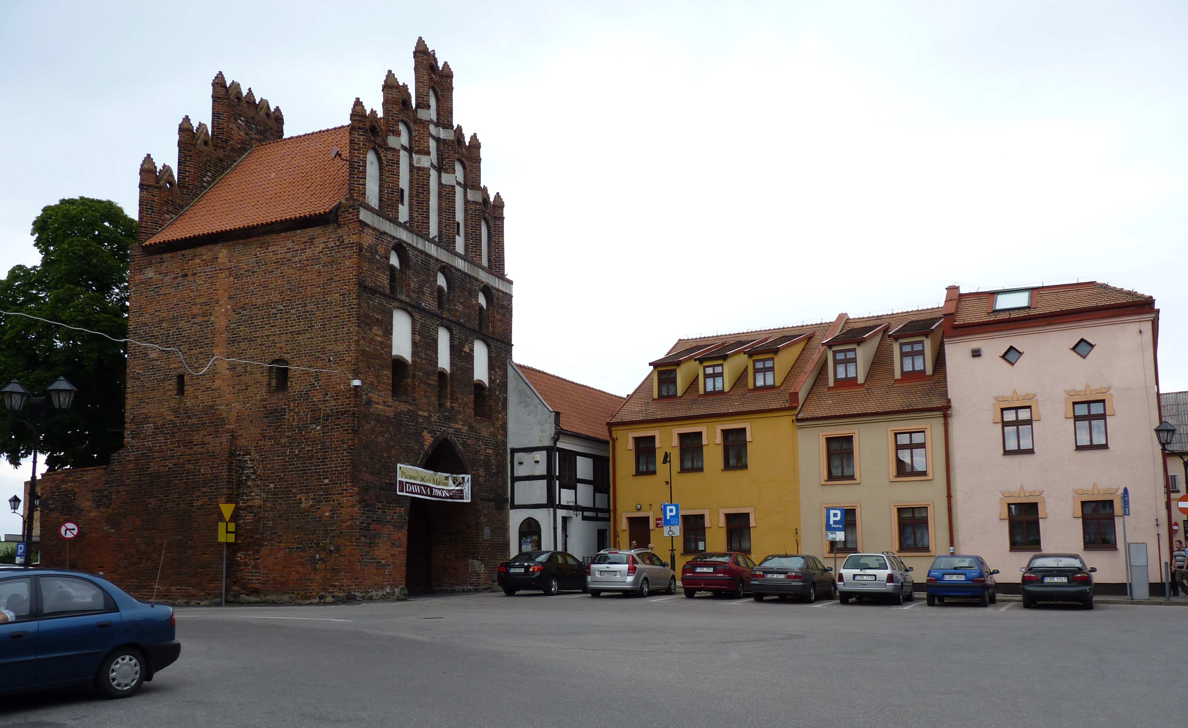 Brodnica - Brama Chełminska